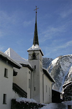 Kirche in Blatten (ob Naters)